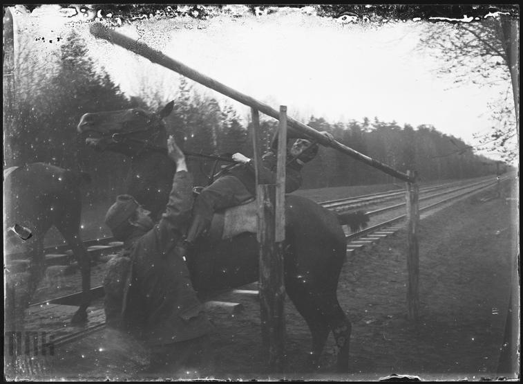 Zdjęcie przedstawia przygotowanie koni do załadunku na eszelon. Wykonano je na stacji kolejowej lub mijance, najprawdopodobniej podczas transportu oddziałów II Brygady Legionów Polskich z frontu na Bukowinie na Wołyń pod koniec października 1915 roku.